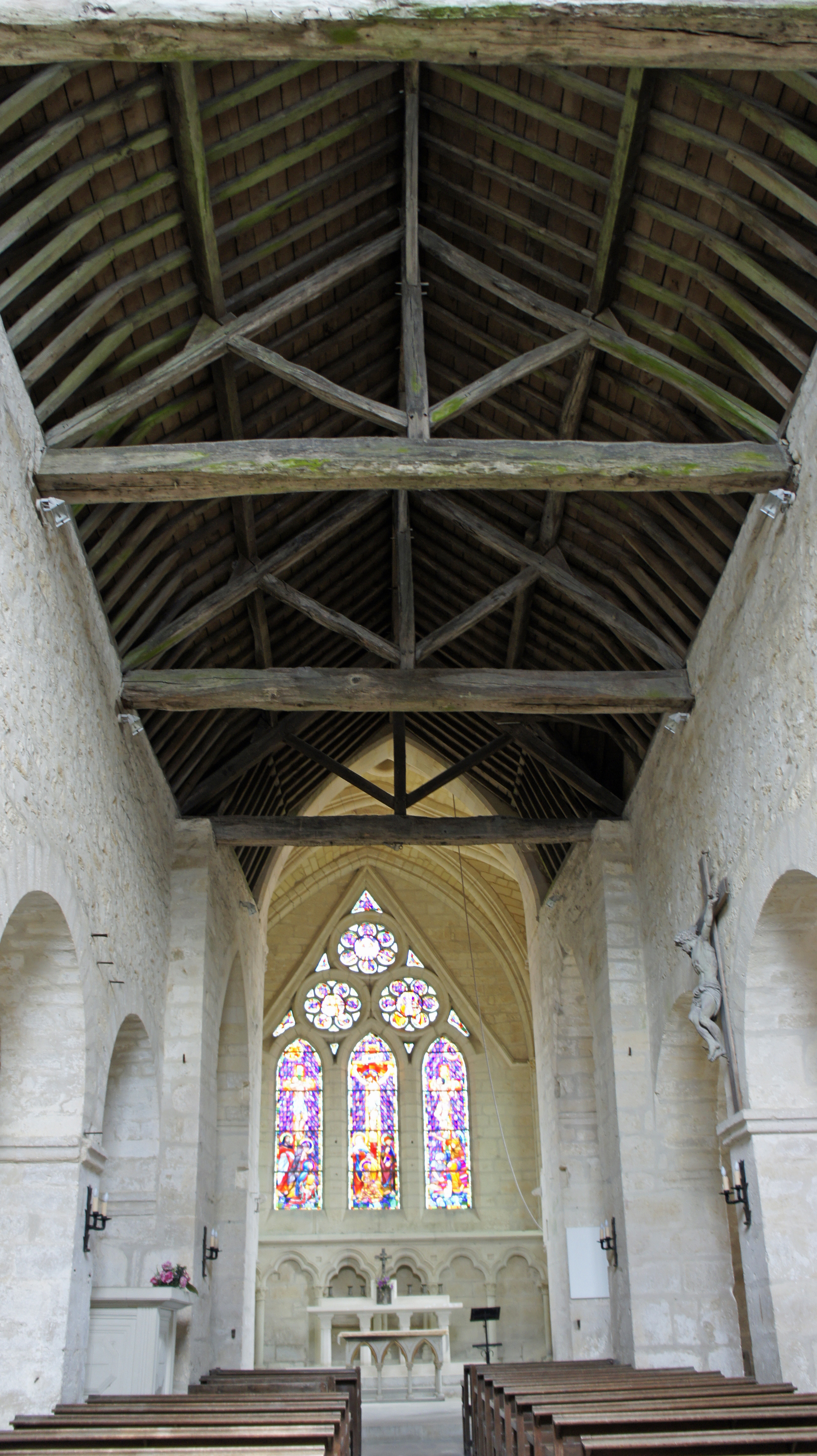 détails de l'Eglise Notre-Dame à Pévy .